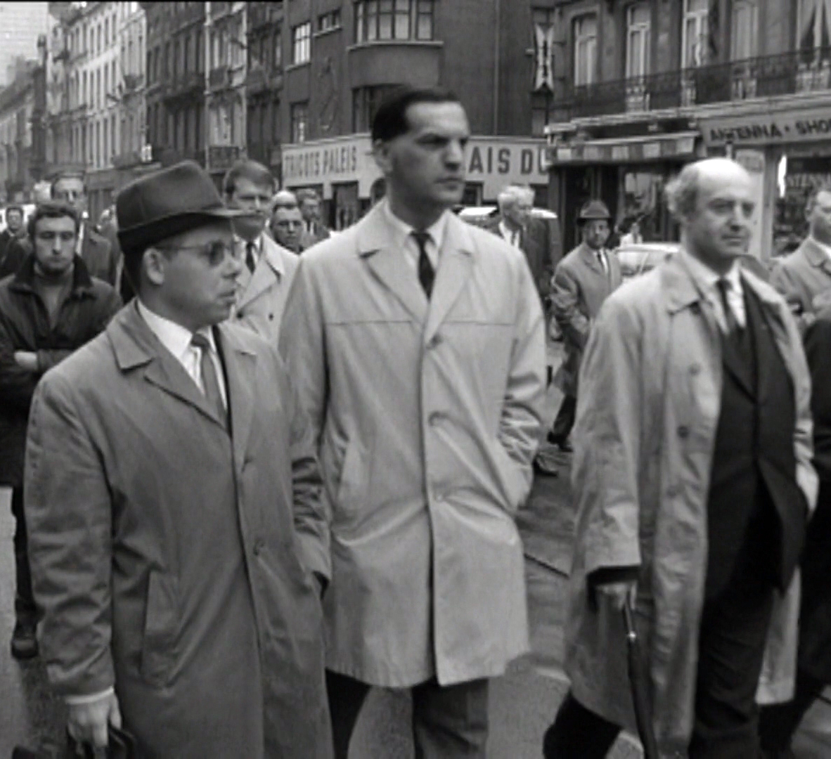 Organisatoren: Vlnr. R. De Wolf, algemeen ondervoorzitter VVTI, S. Van Wichelen algemeen secrataris VVTI, O. François, algemeen voorzitter VVTI.Op de achtergrond J. Stoffelen , (Vlaamse studenten-ingenieur). De ingenieurs en studenten van het Hoger Technisch onderwijs verzetten zicht tegen de plannen van de ministers van Onderwijs P. Vermeylen en A. Dubois voor het invoeren van een derde ingenieurstitel en eisen de rangschikking van hun studies in de hoogste graad van het technisch onderwijs en de juiste klassifikatie op Europees vlak.